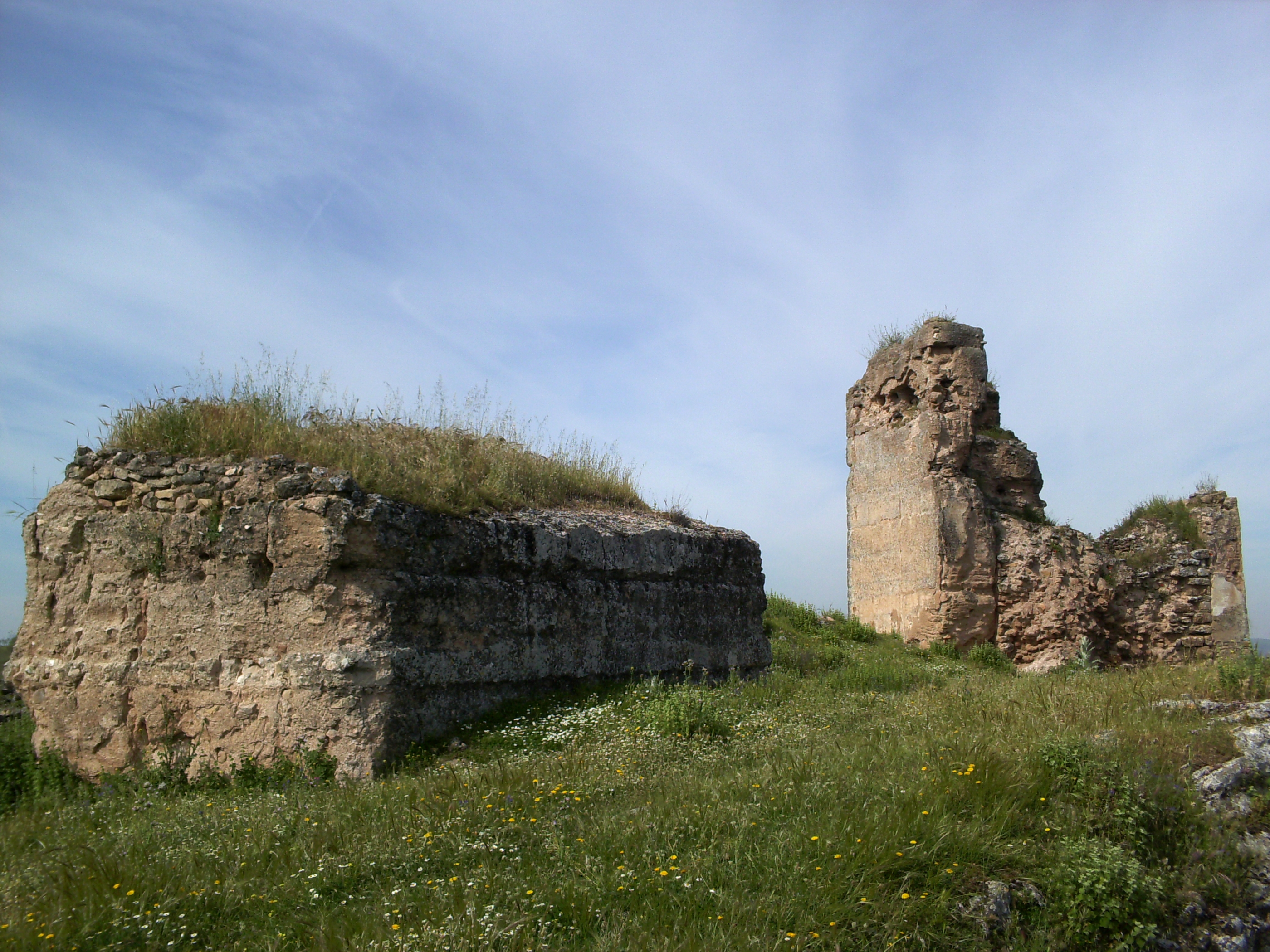 Castillo de Giribaile, en Vilches. Aljibe (a la izquierda) y torre occidental (a la derecha).